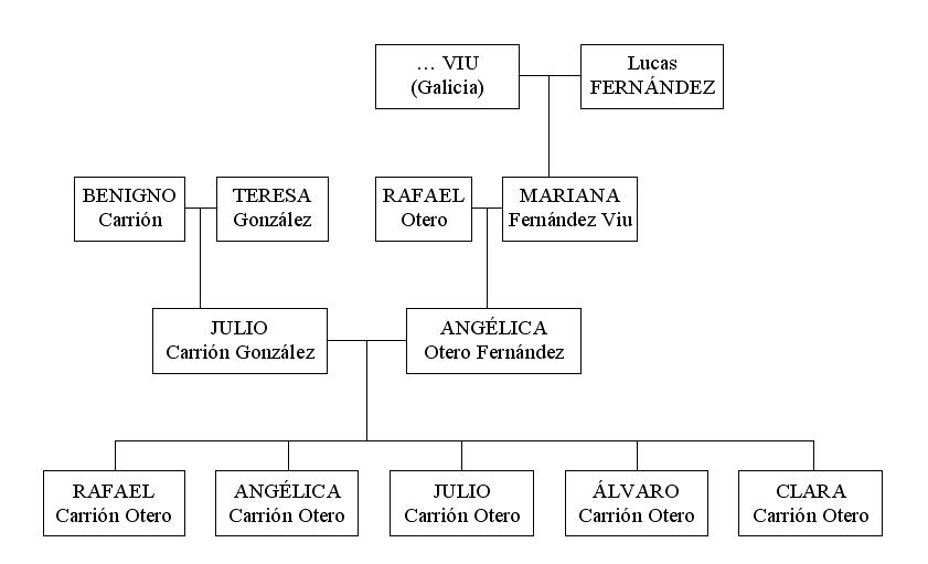 Primer árbol genealógico de la novela EL CORAZÓN HELADO, de Almudena Grandes: Familia Carrión-González